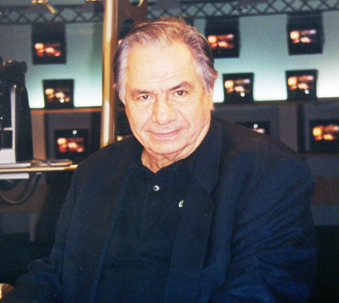 Michel Galabru sur le plateau de la chaîne d'information i-télé, le mercredi 10 novembre 1999.